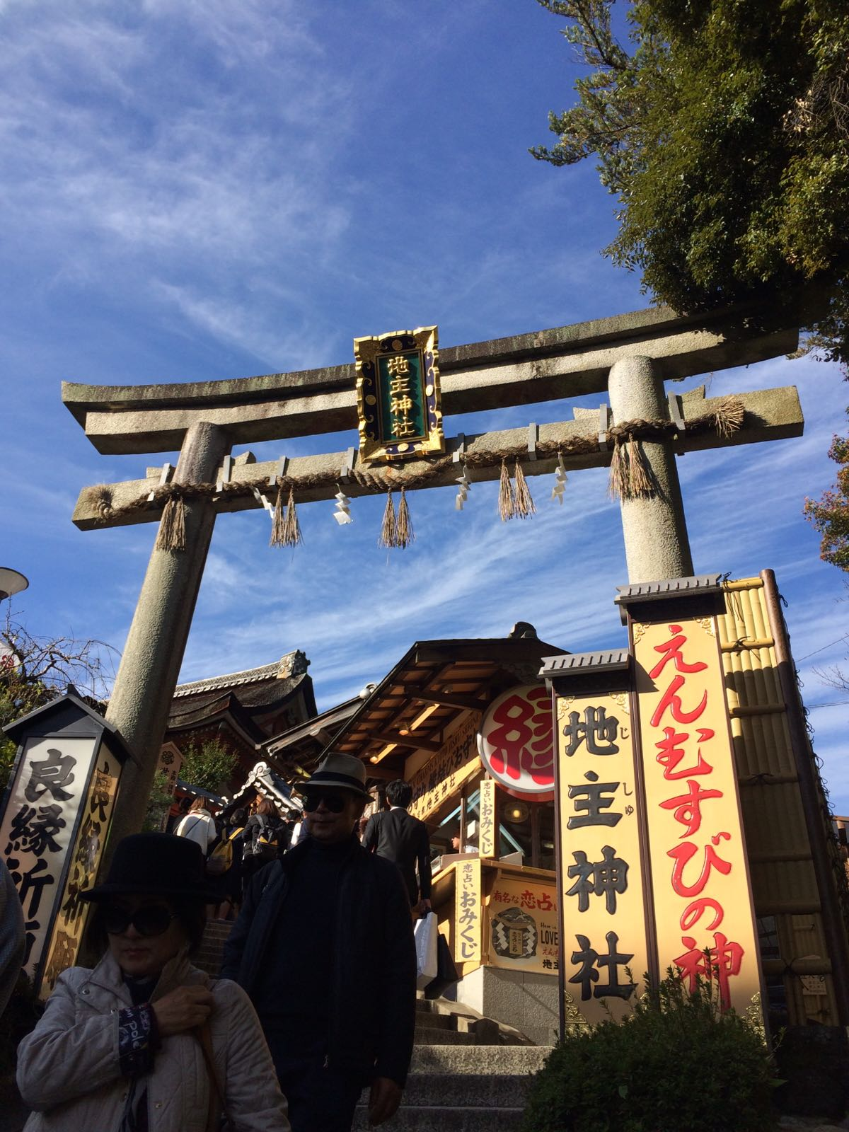 地主神社ゲート